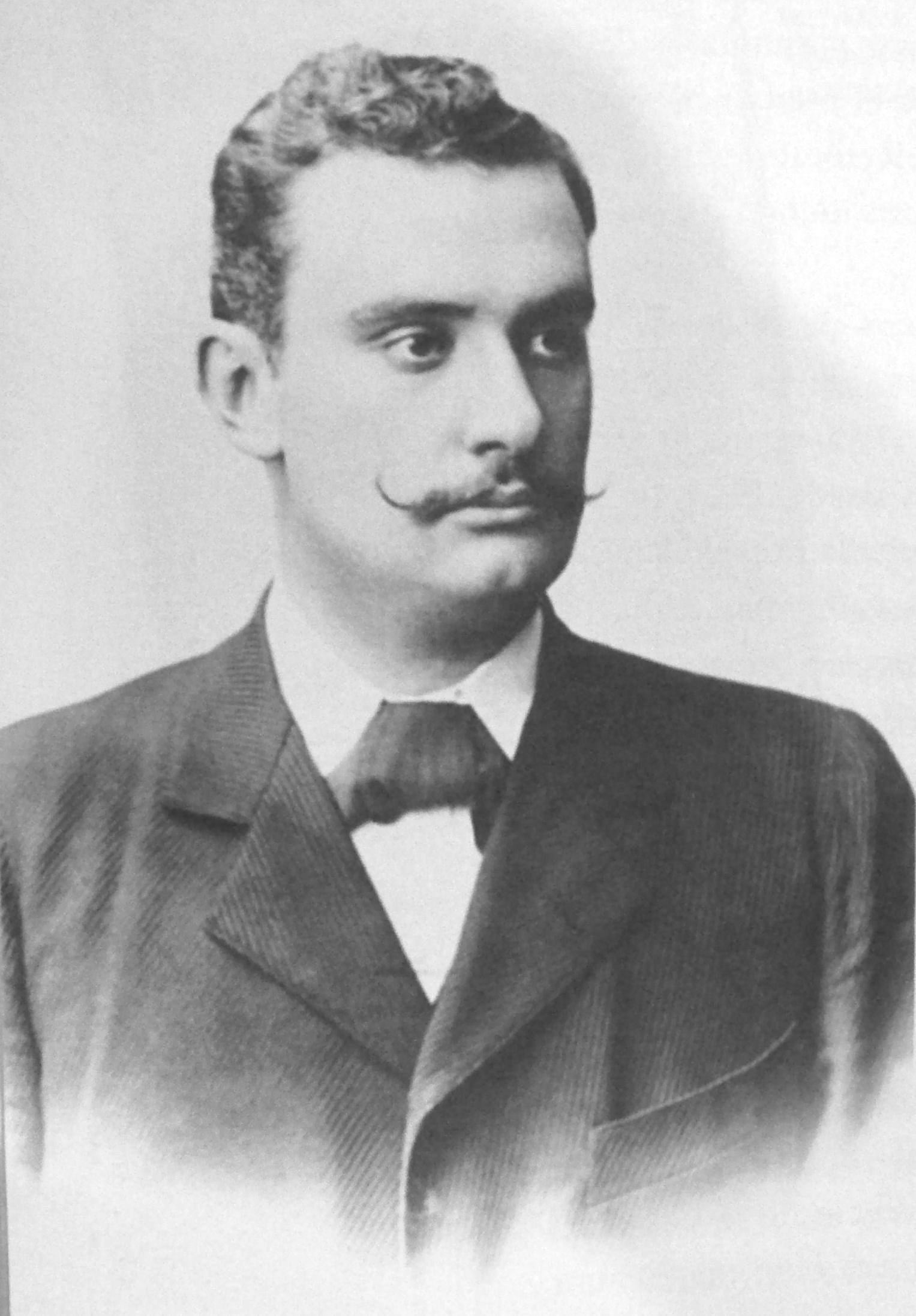 Es una foto del joven oligárquico Marcelo Torcuato de Alvear, en tiempos de la Revolución del Parque, futuro dirigente radical.